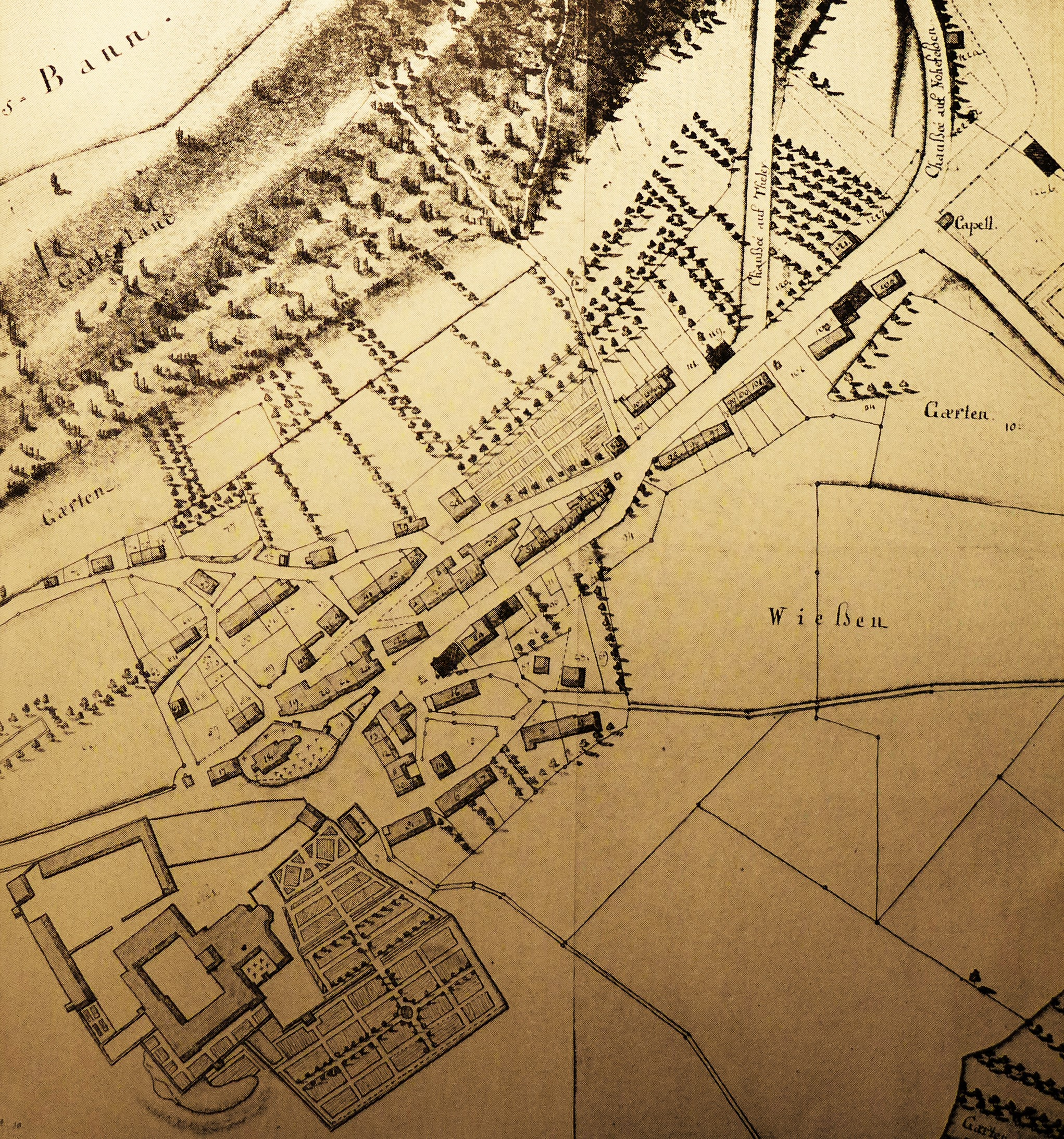 Bebauungsplan von Tholey aufgestellt von dem pfalz-zweibrückischen Landbaudirektor Friedrich Gerhard Wahl, gezeichnet von Philipp Schaefer, Ausschnitt, Unter Nr. 18 ist die im Jahr 1804 abgerissene Pfarrkirche St. Johannes eingetragen, Staatsarchiv Koblenz, Best. 24, Nr. 1012